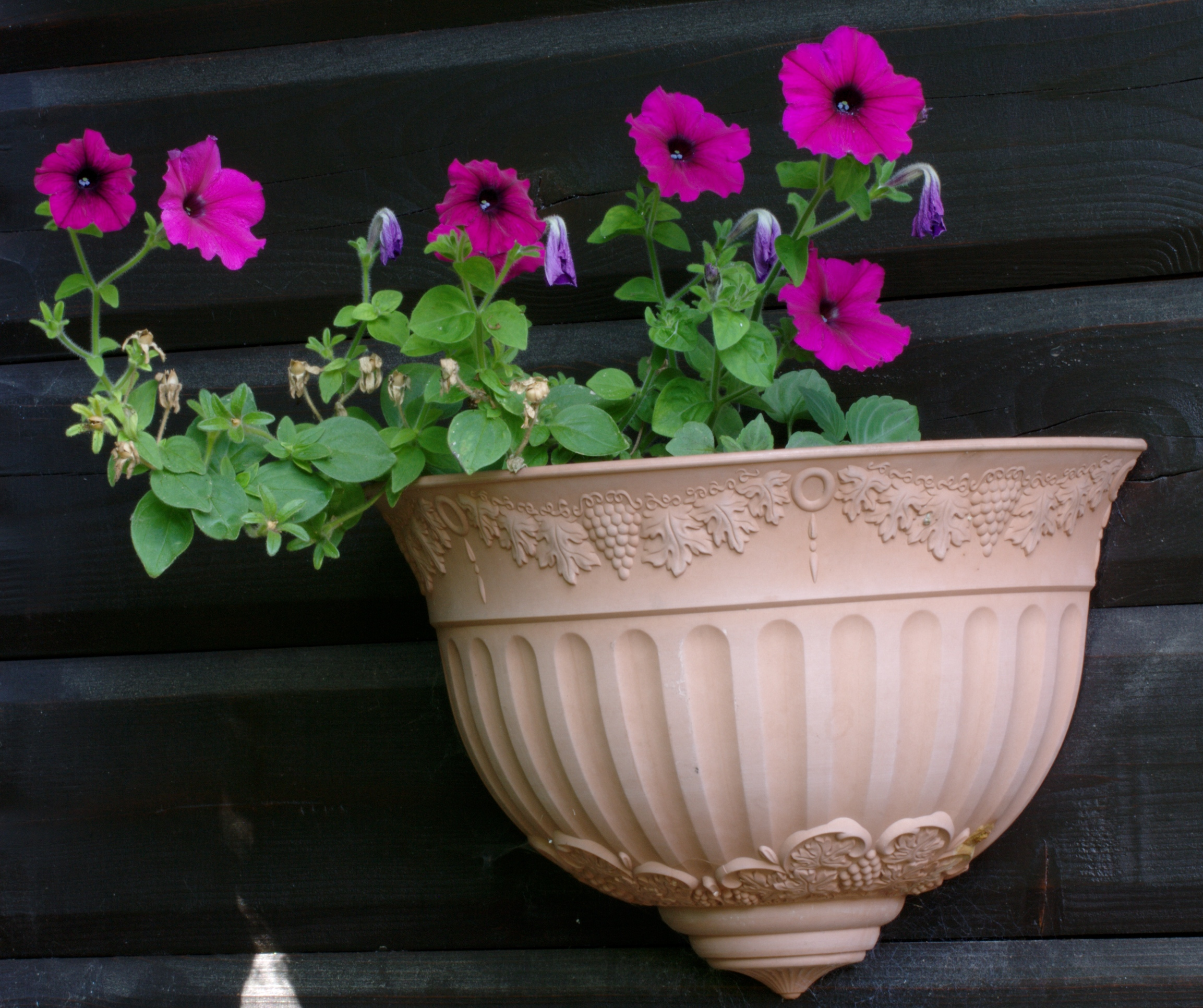 Testbild